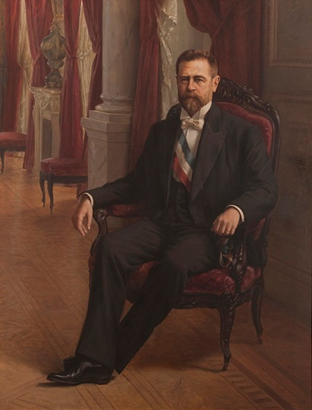 Retrato del Presidente de Chile (1901 - 1906) Don German Riesco Errázuriz